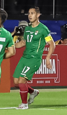 (São Paulo - SP, 14/06/2019) Segundo gol da seleção Brasileira de Futebol. Foto: Marcos Corrêa/PR